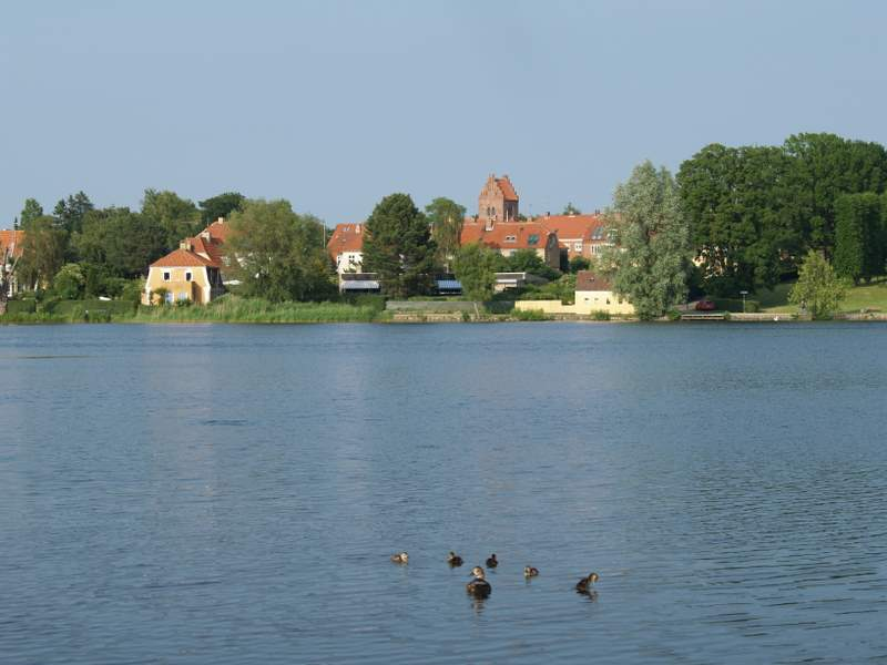 Gentofte Sø, Denmark (July 2010).